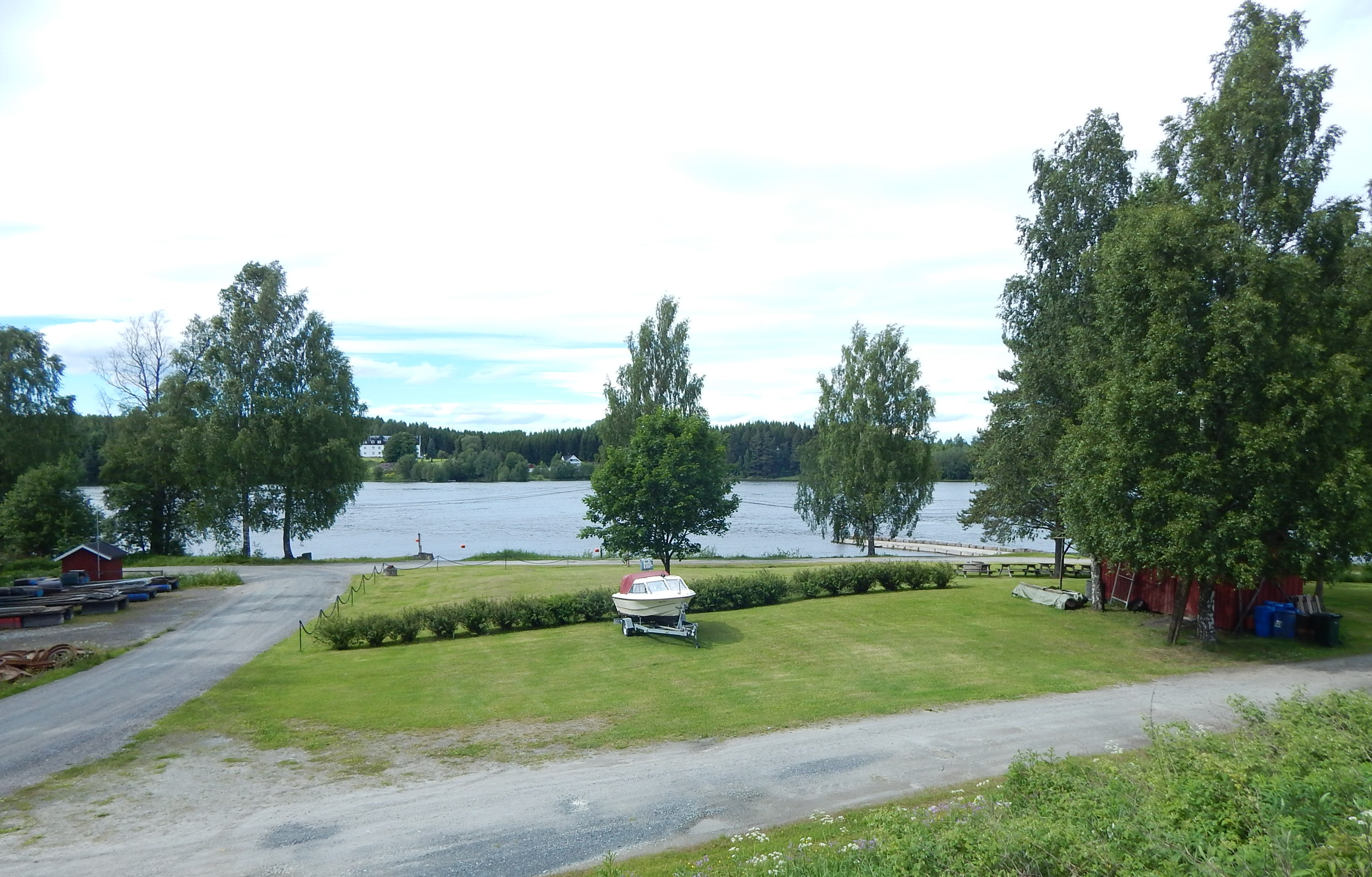 Ved Glomma, nedenfor Haga stasjon (Nes i Akershus)